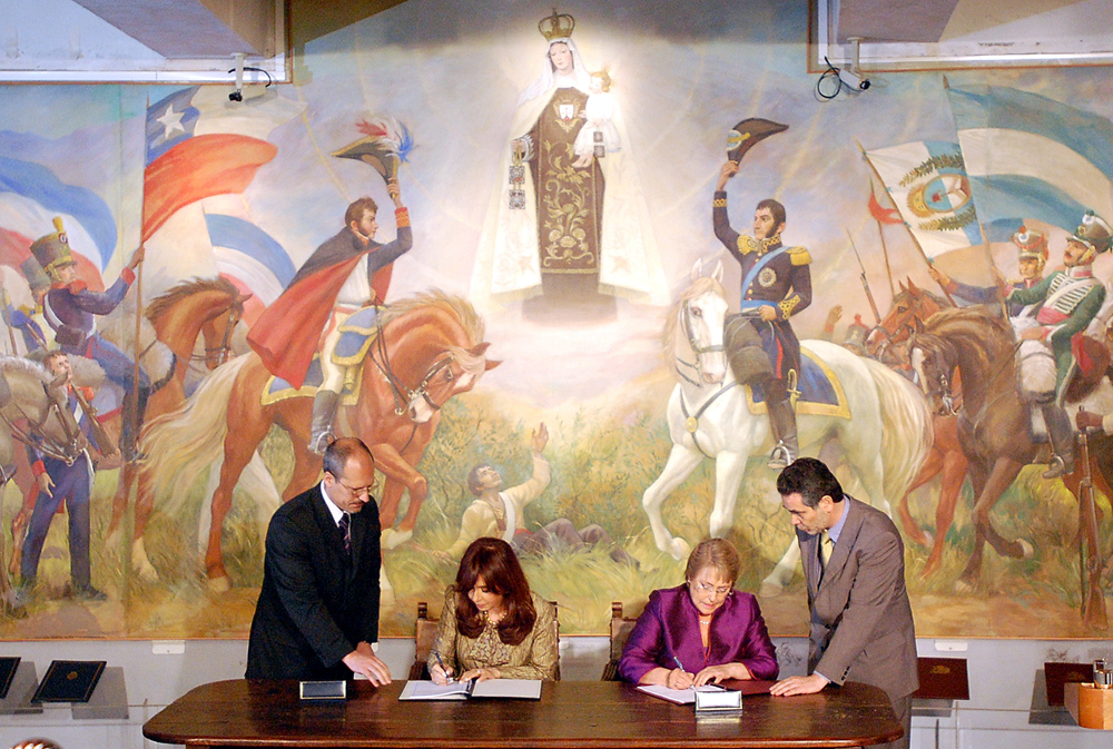 Firma del Tratado de Maipú; realizado en Santiago el 30 de octubre 2009 por las presidentas Bachelet y Fernández, de Chile y Argentina respectivamente.